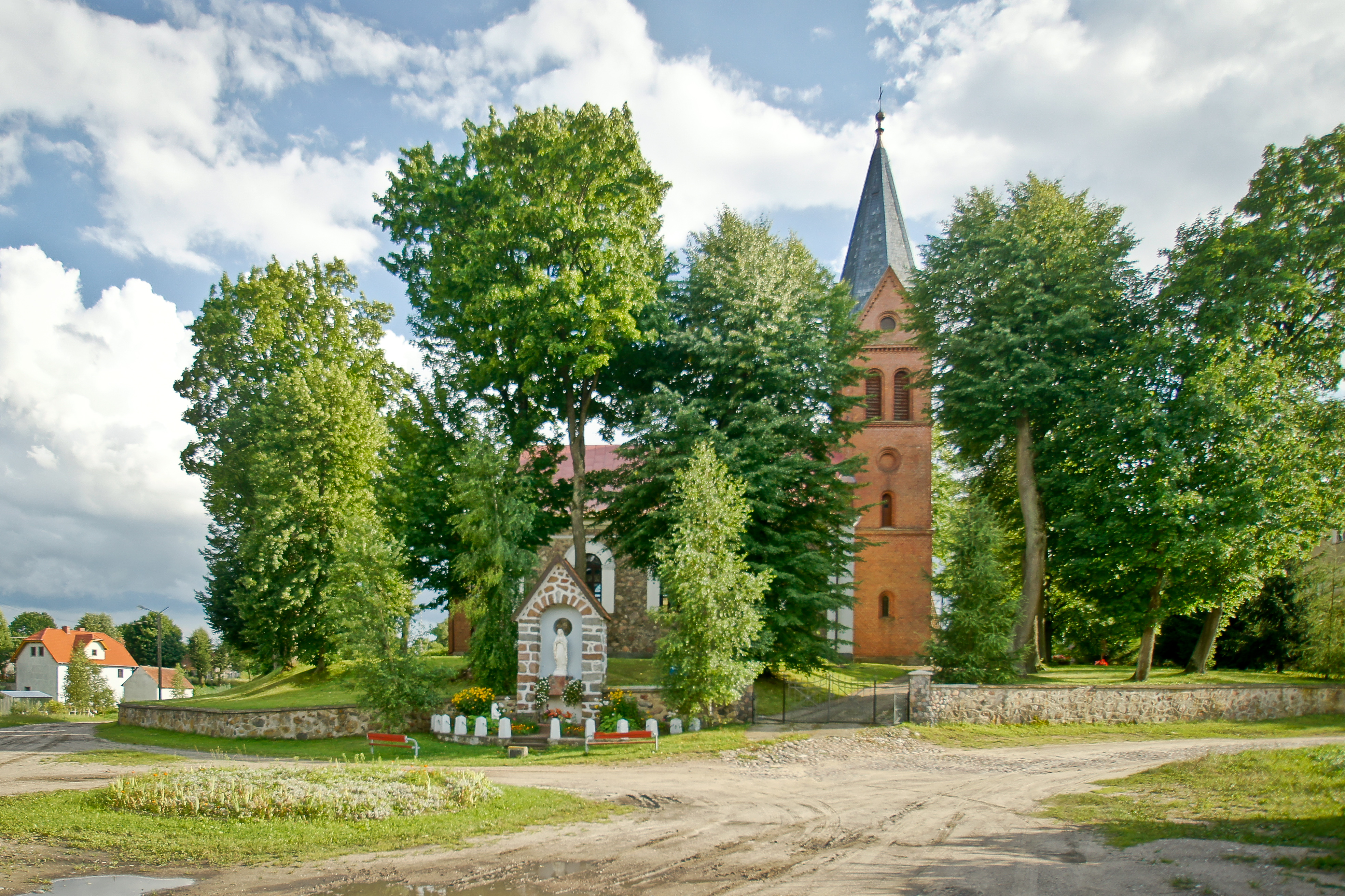 Dawny kościół ewangelicki, obecnie rzymsko-katolicki p.w. Opatrzności Bożej z 1832 roku w Sterławkach Wielkich (zabytek nr rejestr. 532)